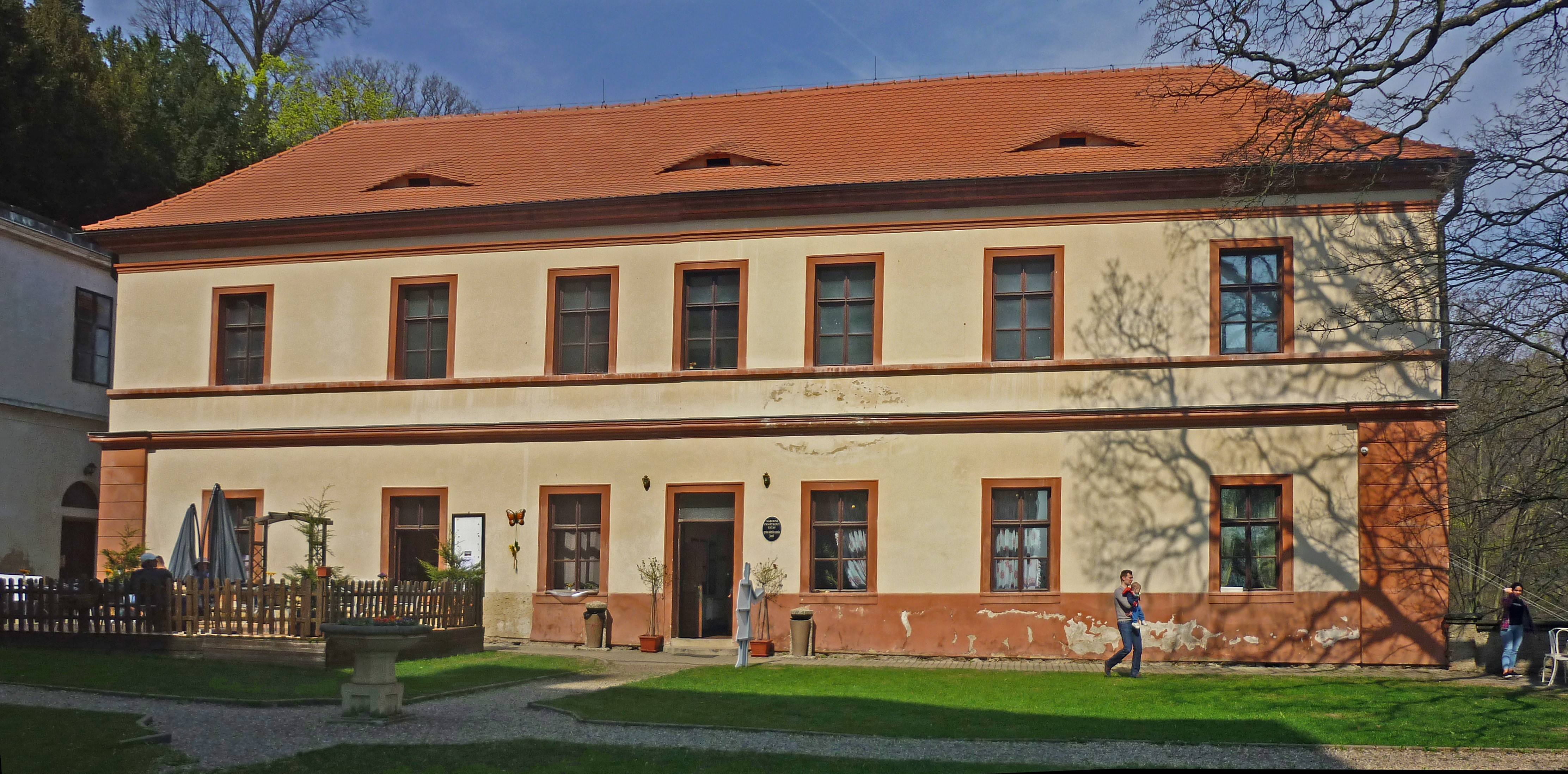 Schloss Eisenberg (Zámek Jezeří) bei Horní Jiřetín (Obergeorgenthal), Nebengebäude